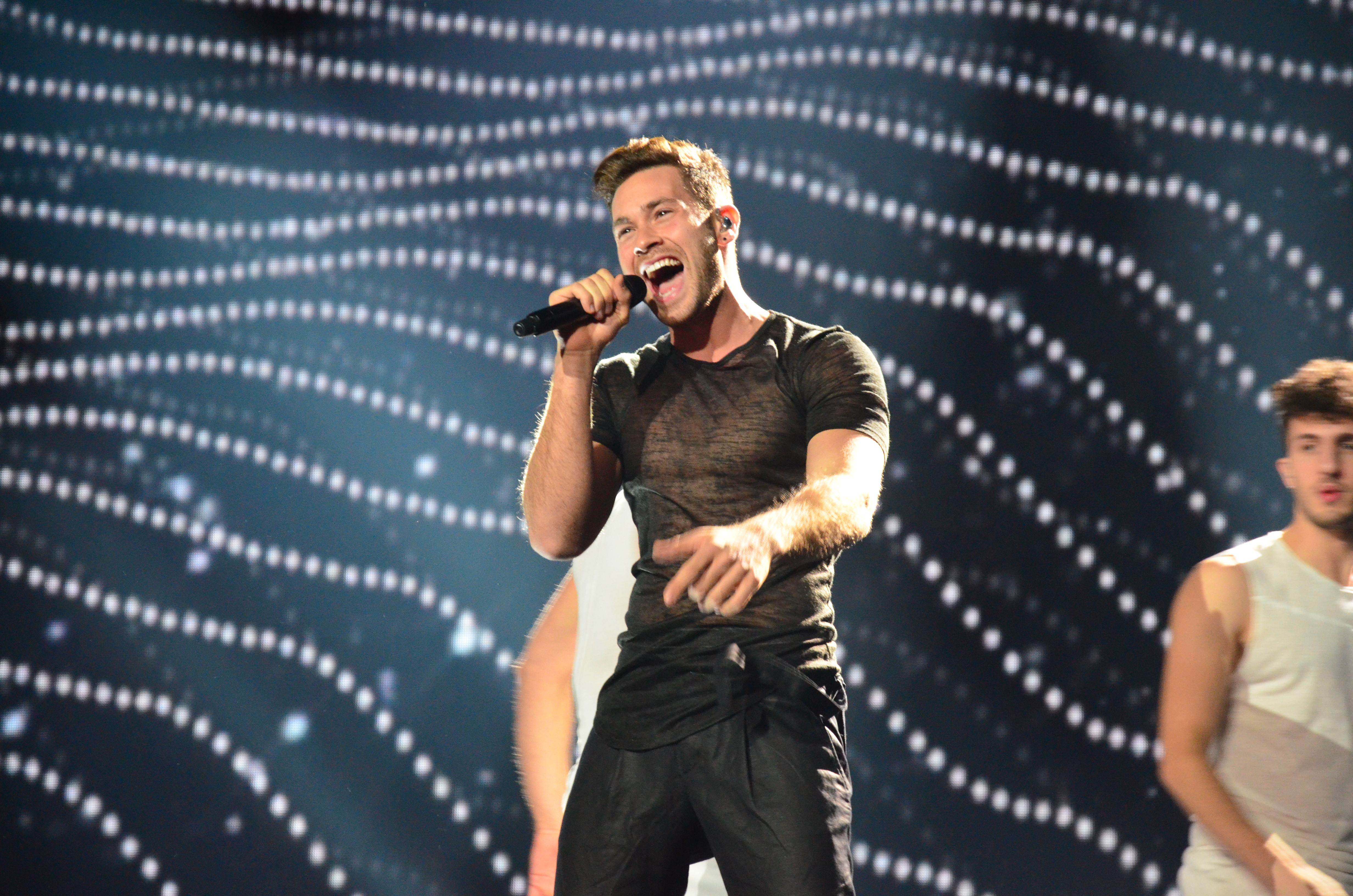 12 травня. Генеральна репетиція фіналу Євробачення 2017. IMRI (Israel)